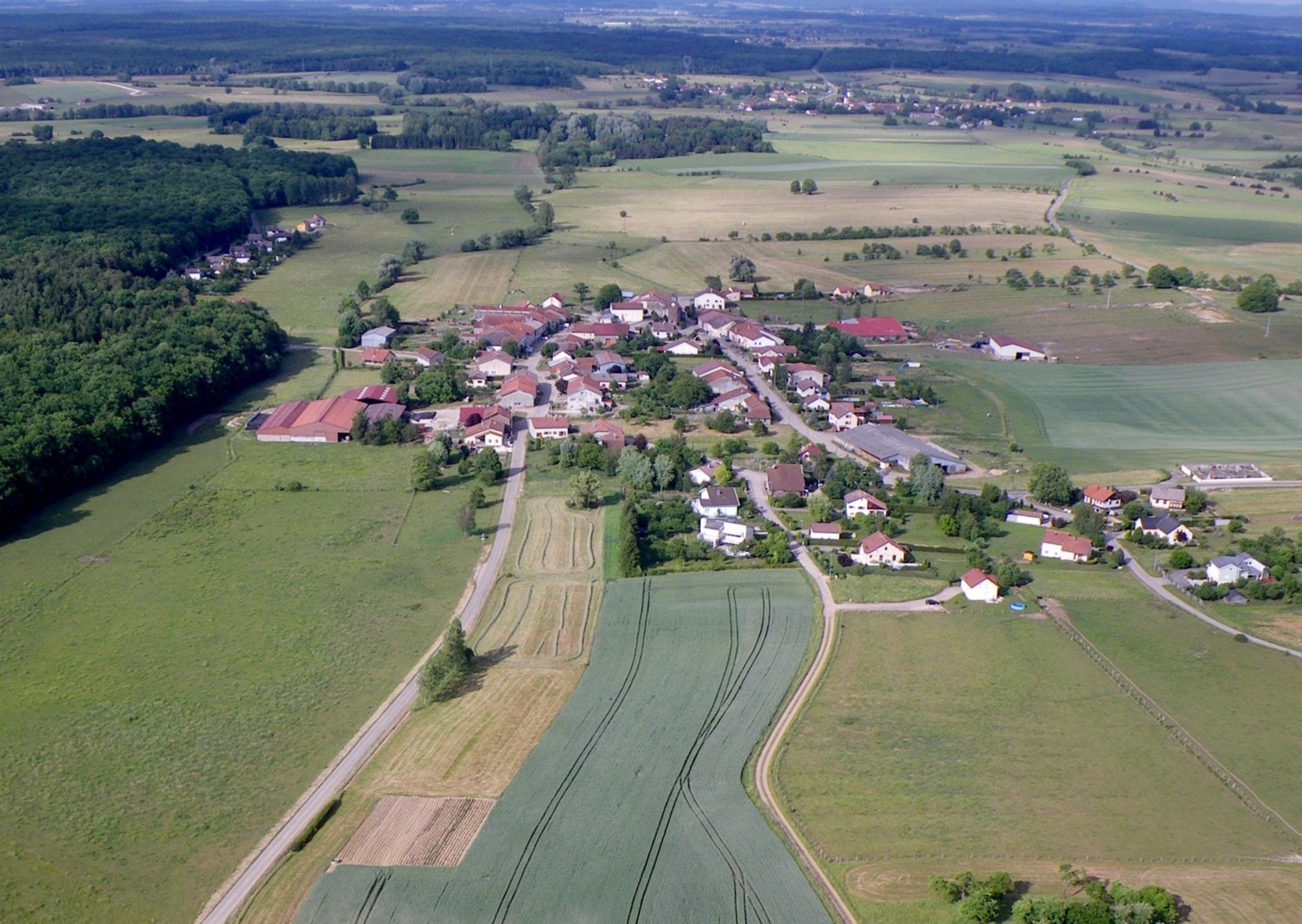 Village de Dignonville - Vue générale